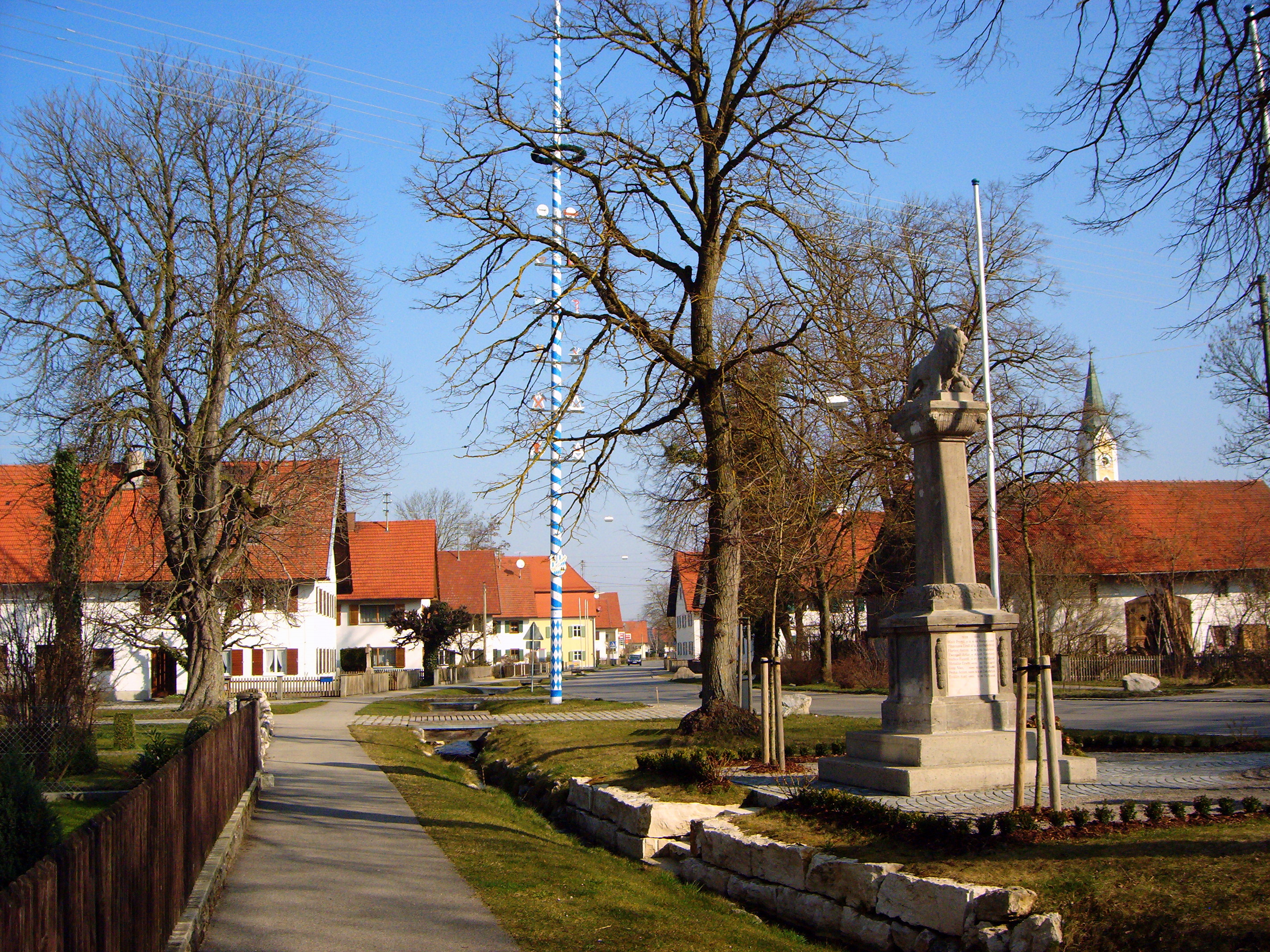 Igling, Hauptstrasse in Unterigling